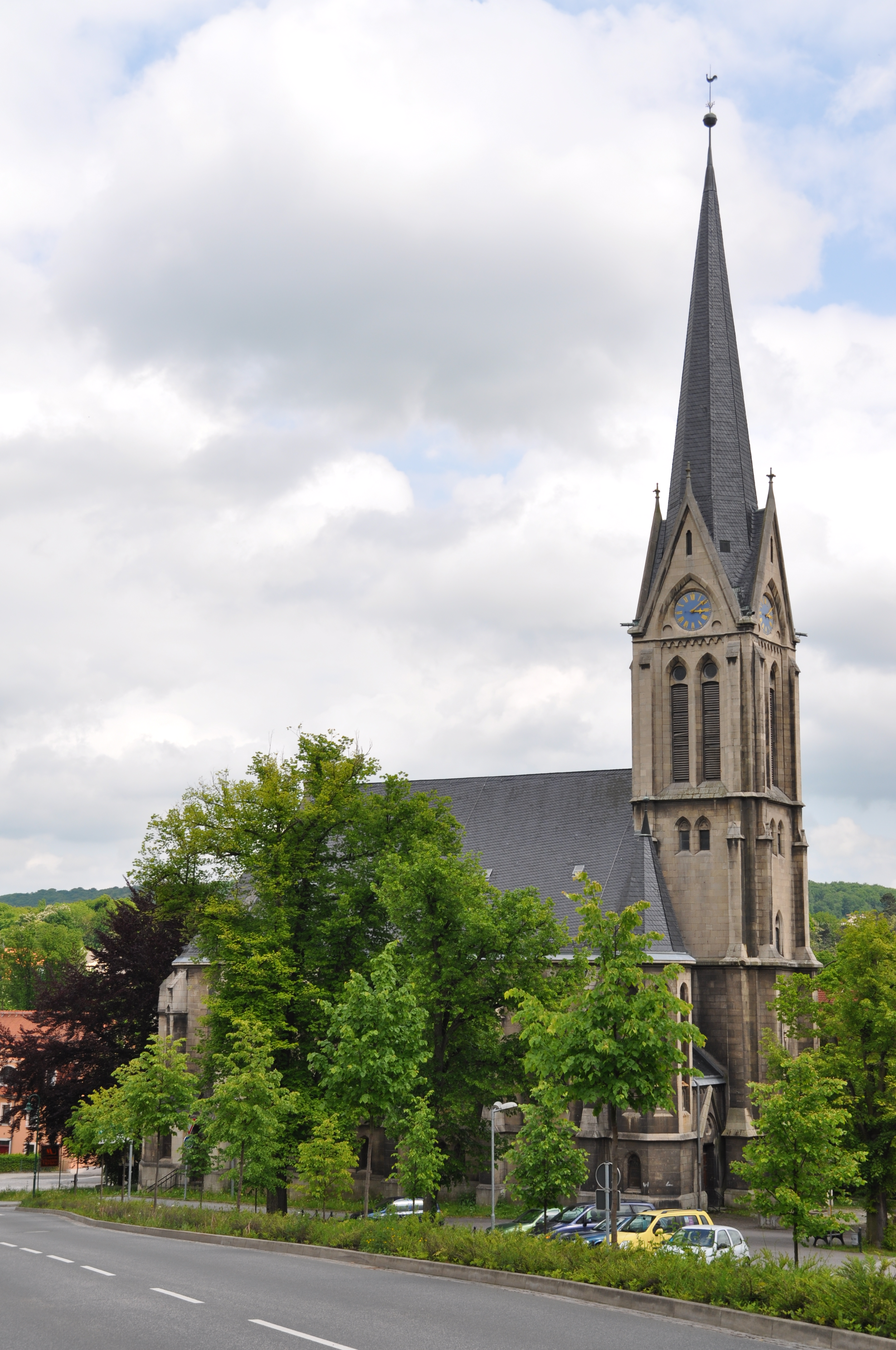 Lutherkirche in Bad Kösen (Deutschland)